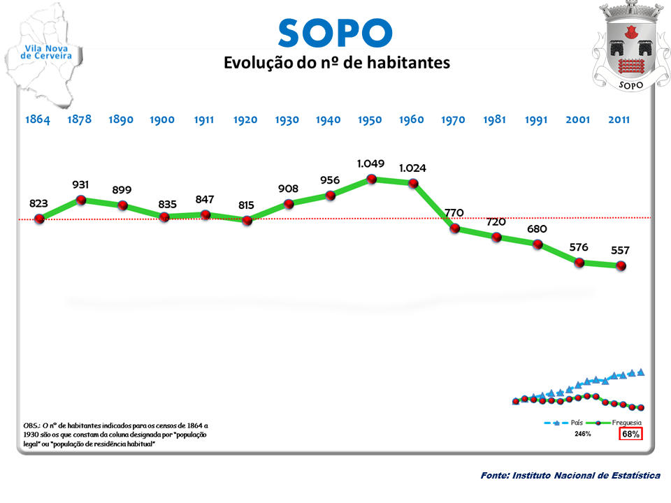 Censos 1864/2011